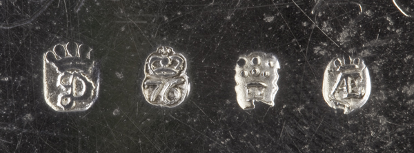 Poinçons sur une pièce en argent, poinçonnée entre 1750 et 1763 à Mons, Belgique